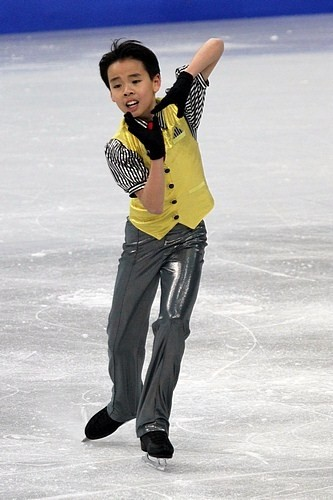 Nam Nguyen (Канада) на чемпионате мира по фигурному катанию среди юниоров 2012